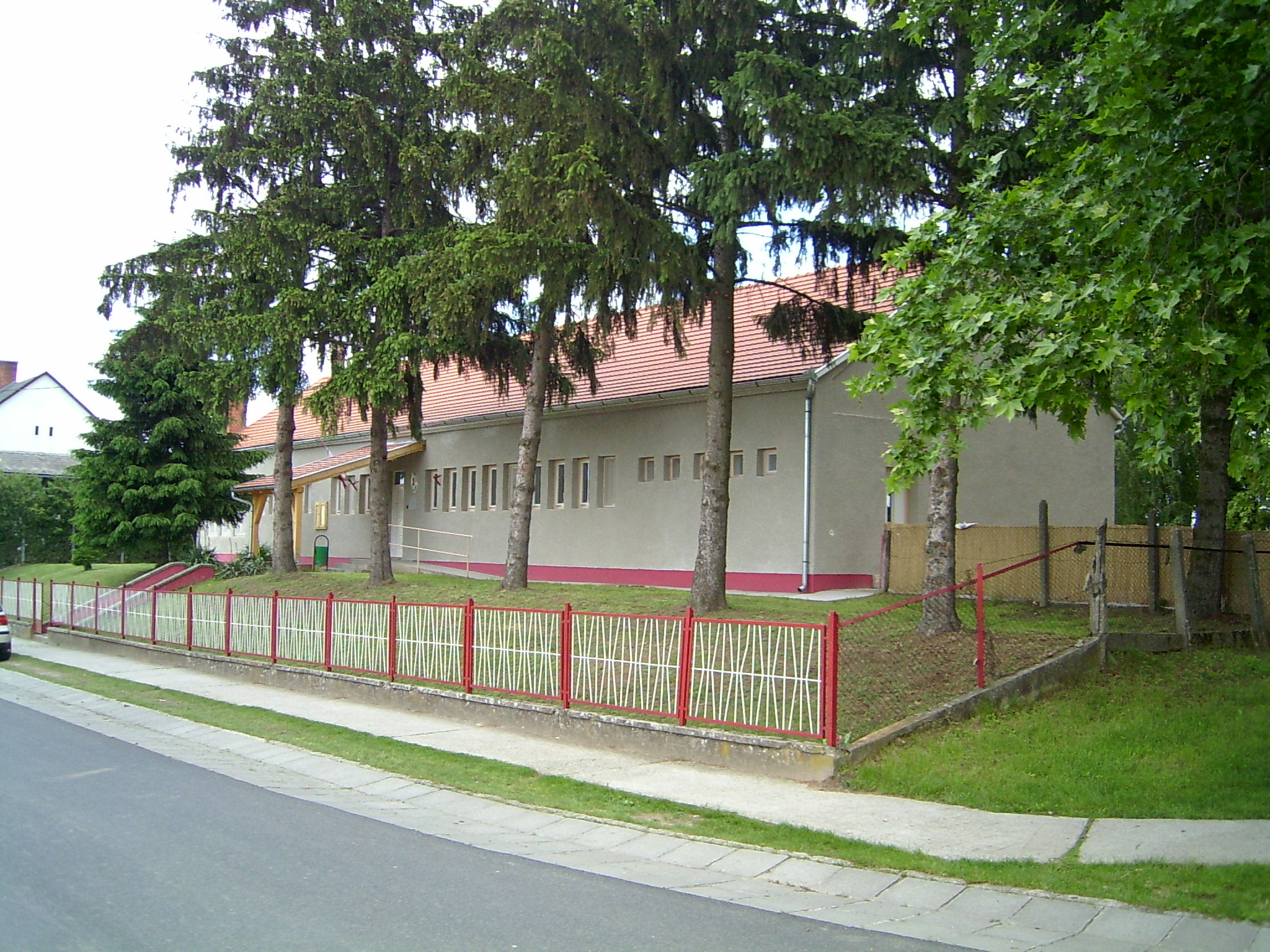 Mezőcsokonya, óvoda